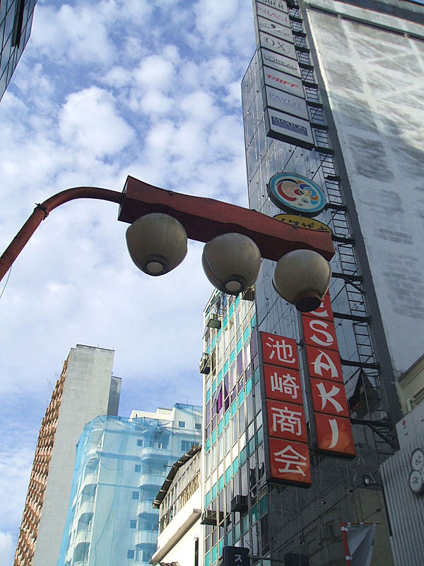 Bairro da Liberdade, centro de São Paulo, Brasil